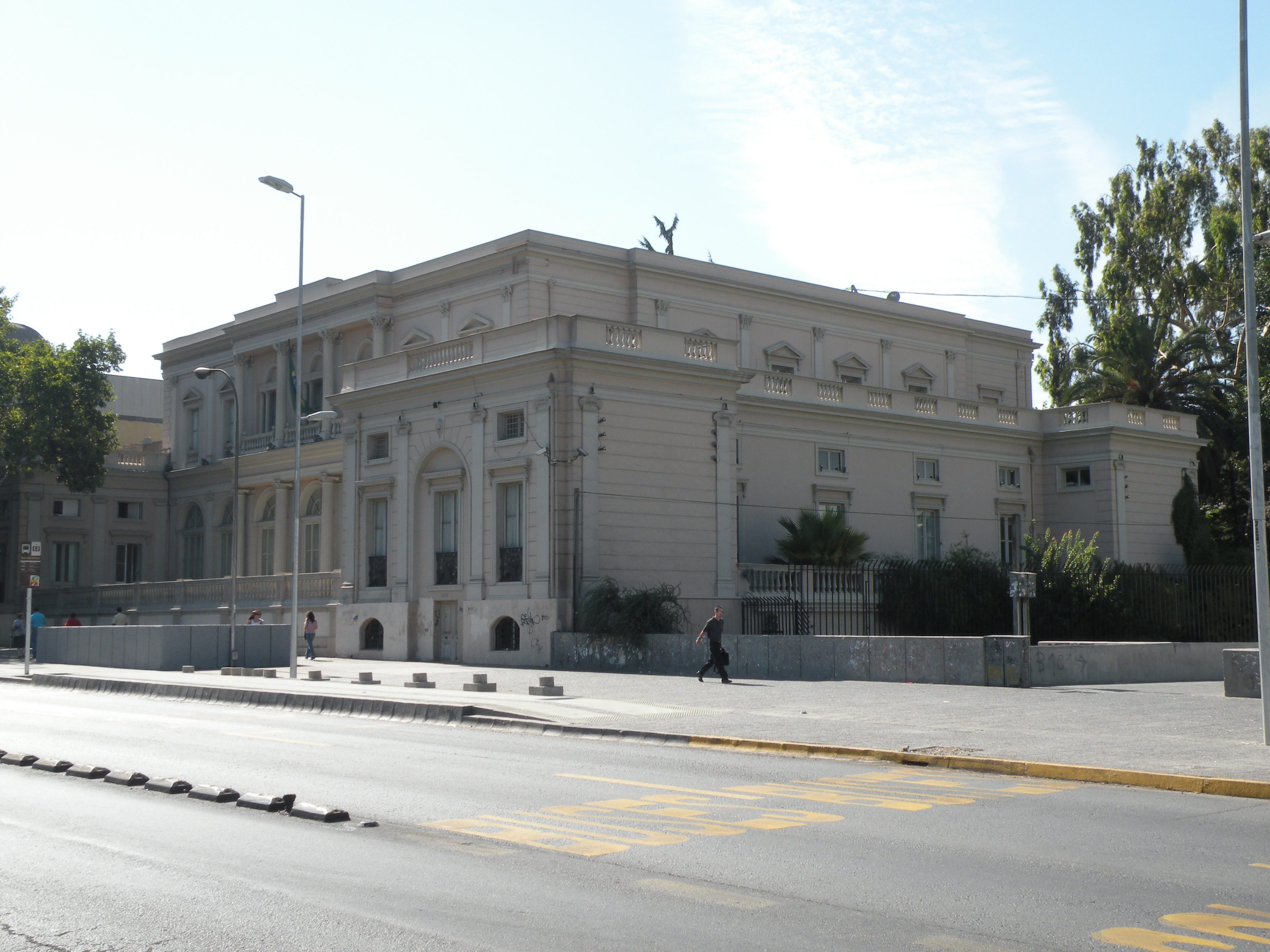 Palacio Errázuriz, actual Embajada y Consulado de Brasil en Chile.